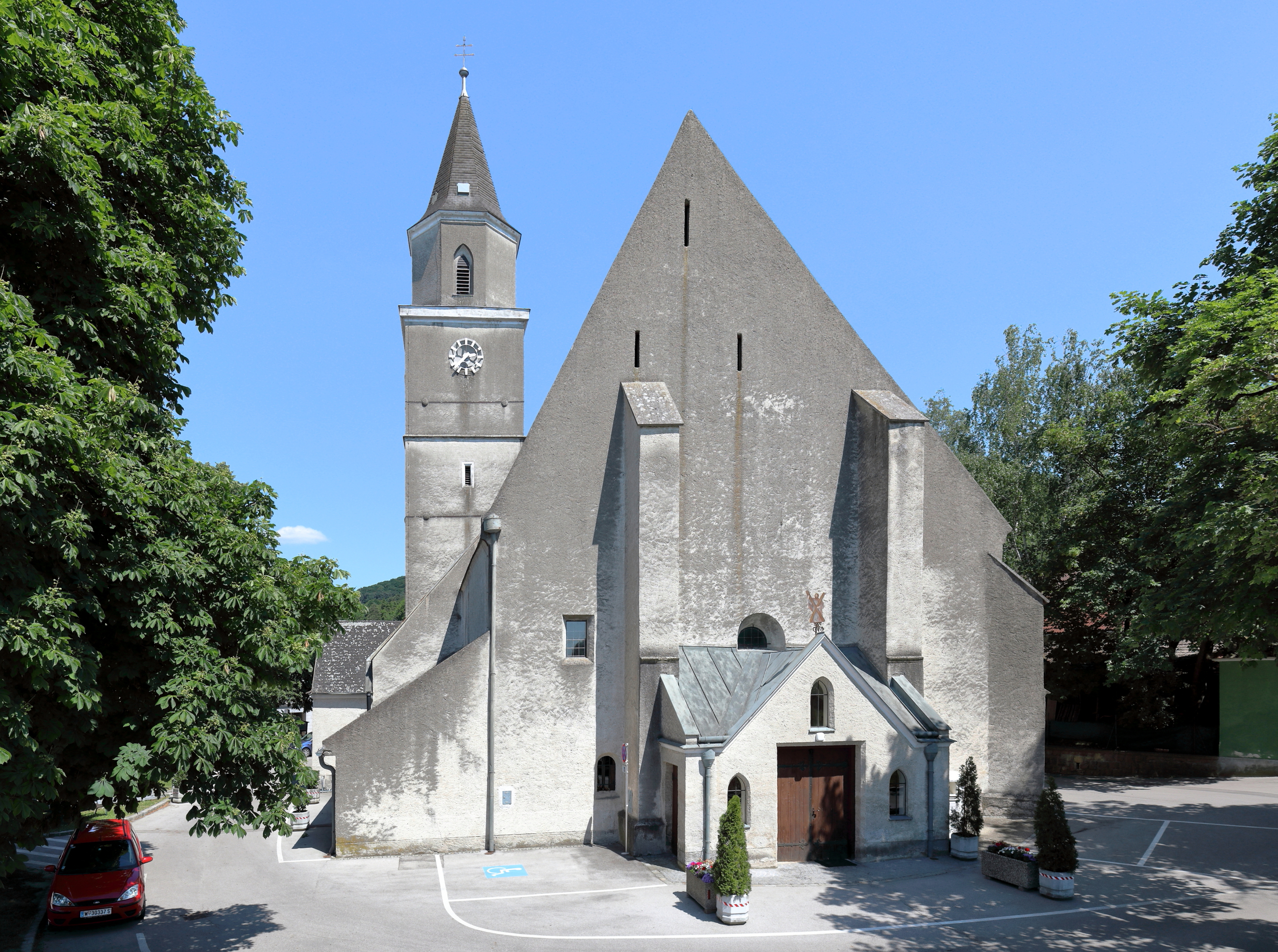 Westansicht der Pfarrkirche St. Andrä vor dem Hagental in Niederösterreich